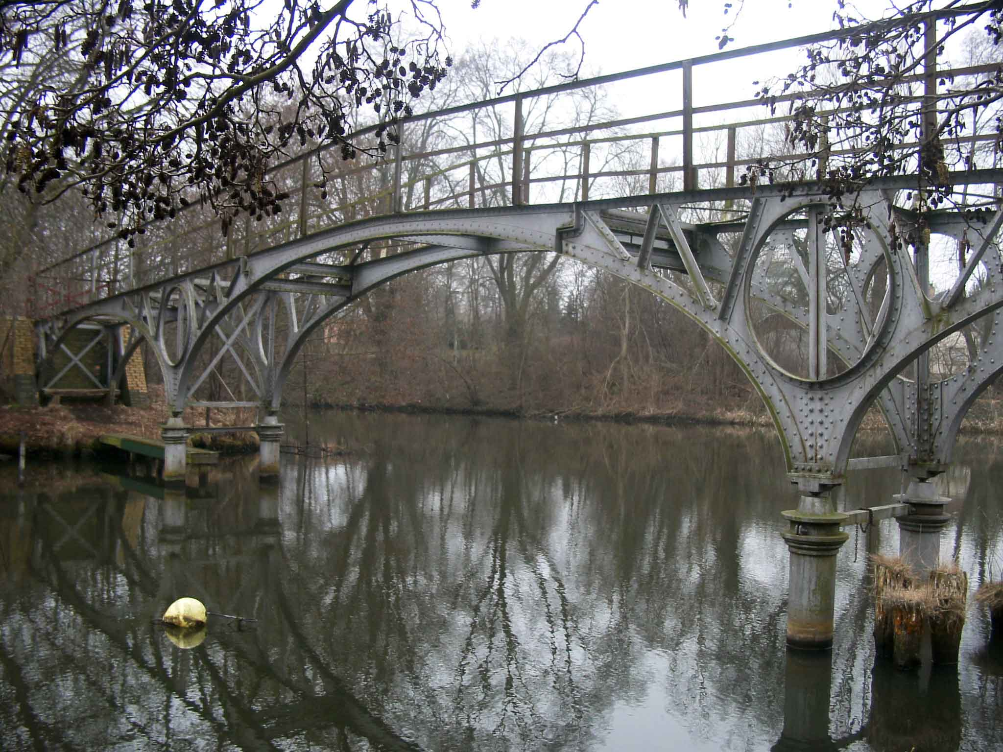 Bildautor: Dorina Andress Aufnahmedatum: 26. 03. 2005 Ricoh RDC-i 500, Aufnahmemodus TIF, 150 ASA, Originalgröße, 10% Qualität als JPG gespeichert